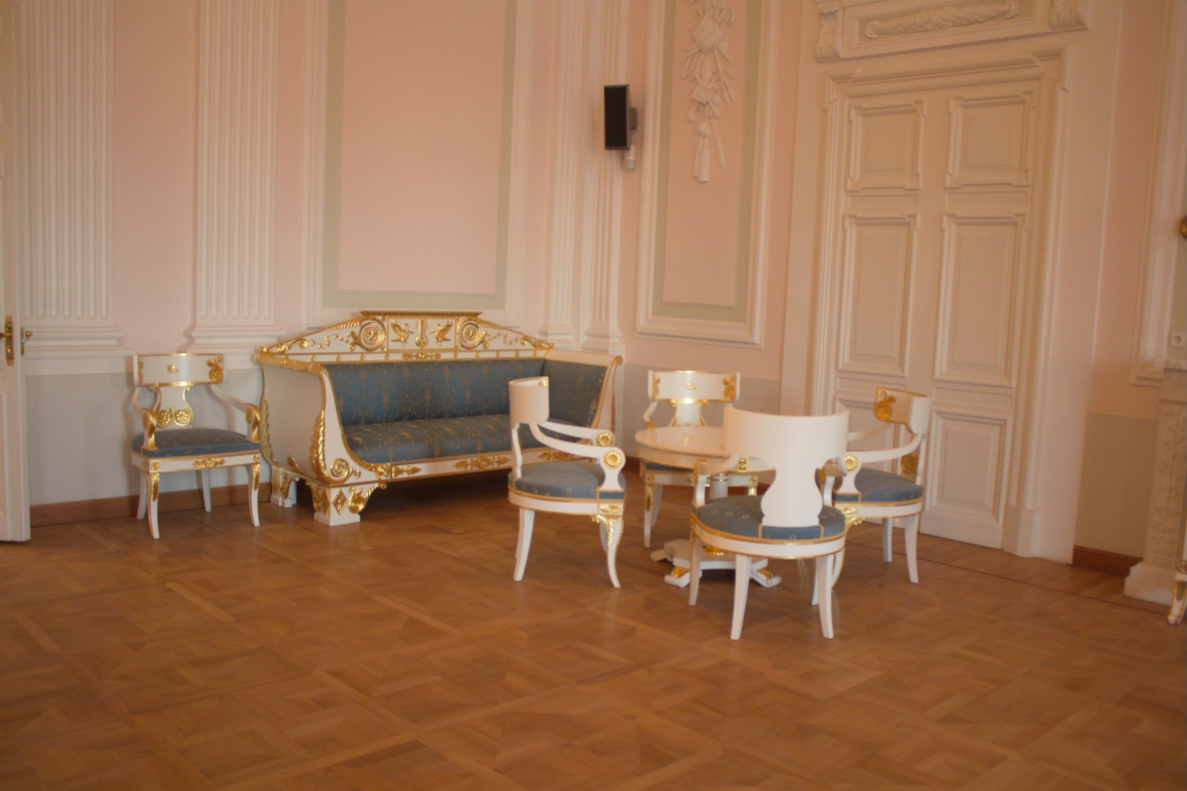 Петровский путевой дворец. После реконструкции. Новодельная мебель в "ампирном стиле".